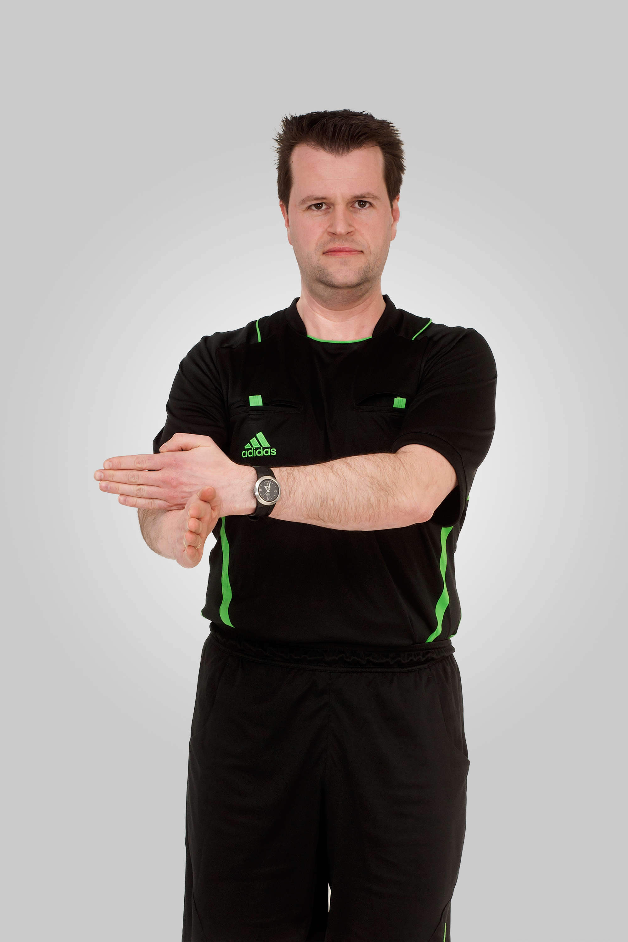 Internationale Handballregeln Handzeichen 05 Schlagen